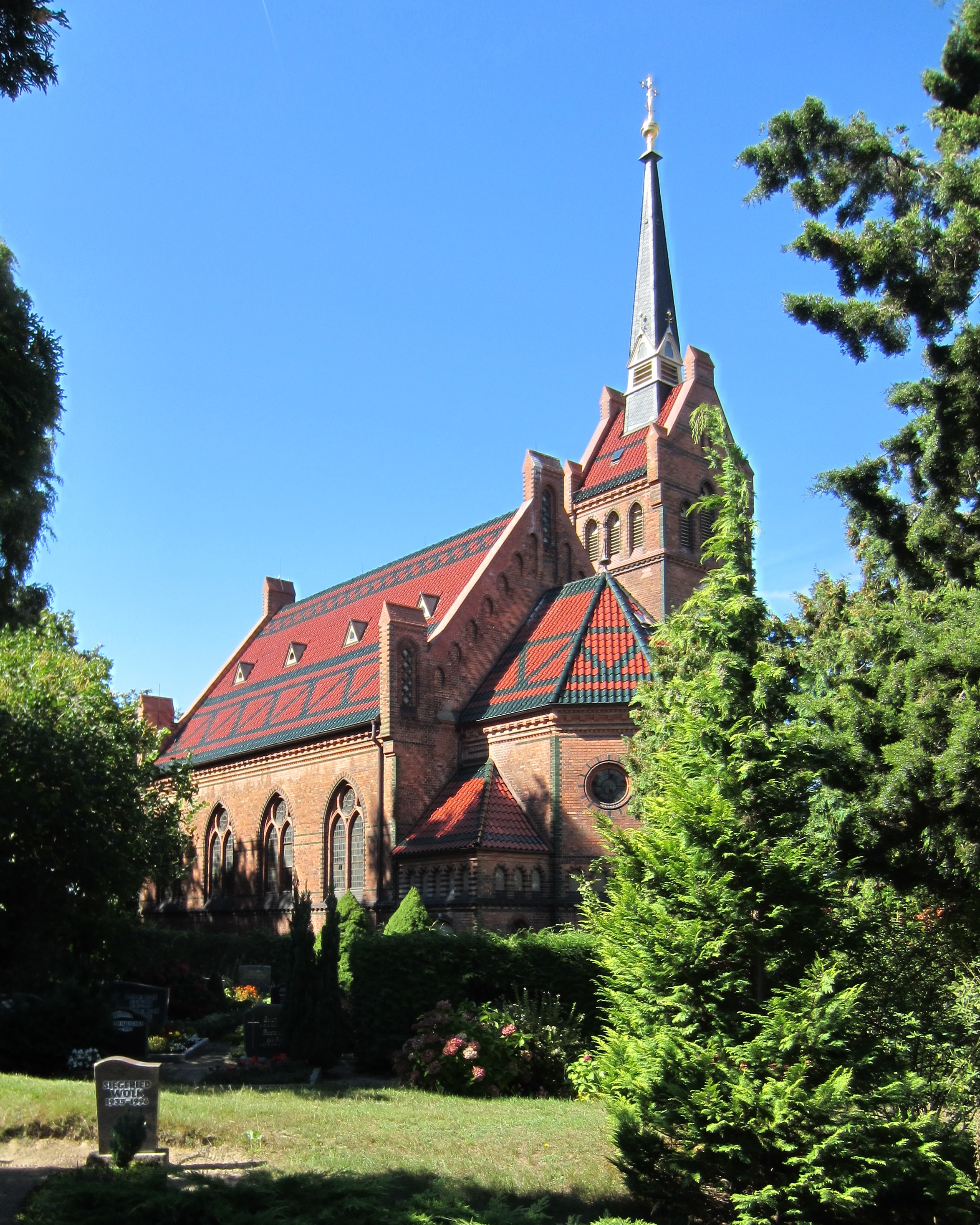 Neue Dorfkirche in Golm, Potsdam, Ansicht von Südosten